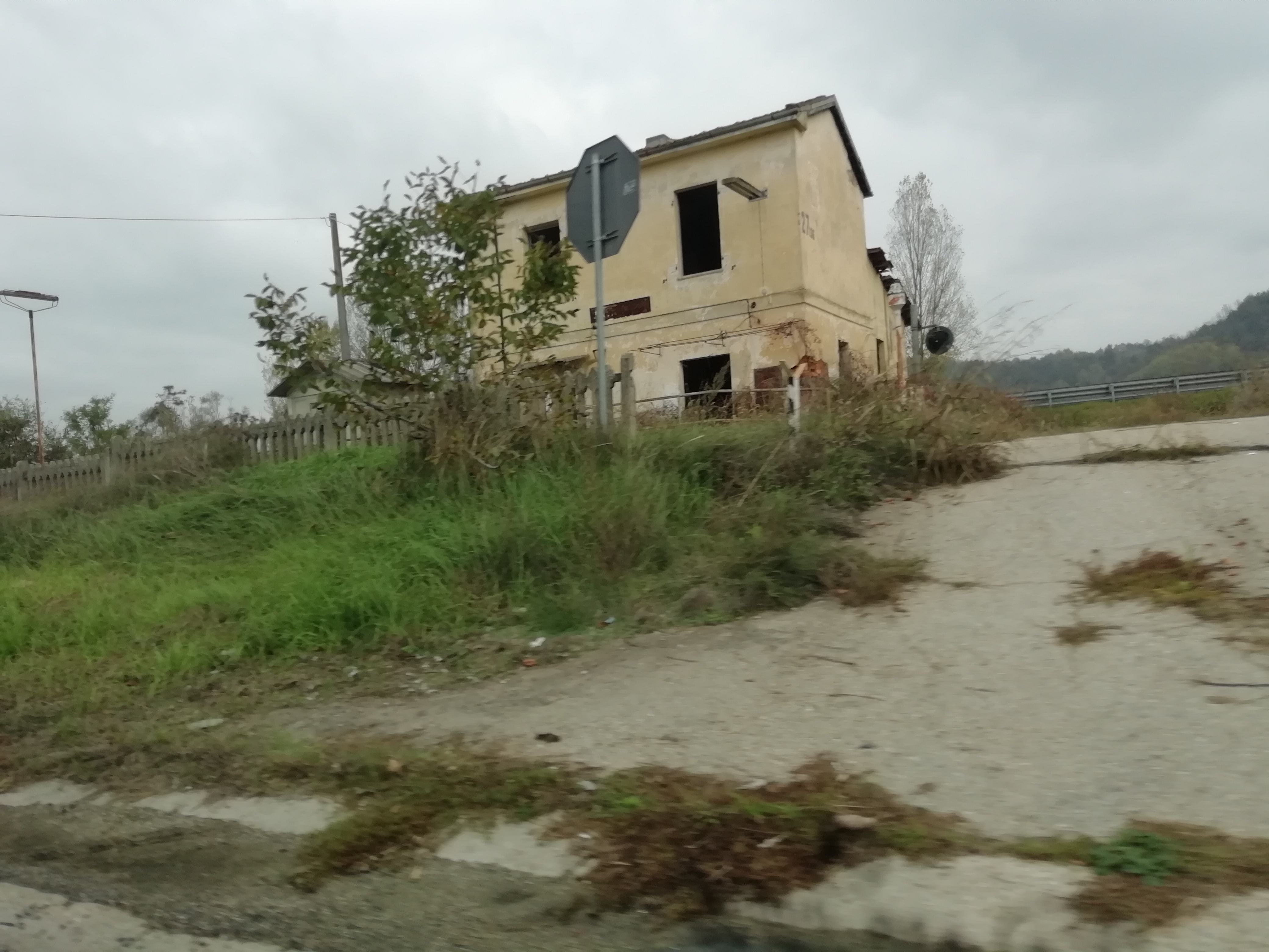 la fermata di Casa dei Coppi durante il novembre 2019